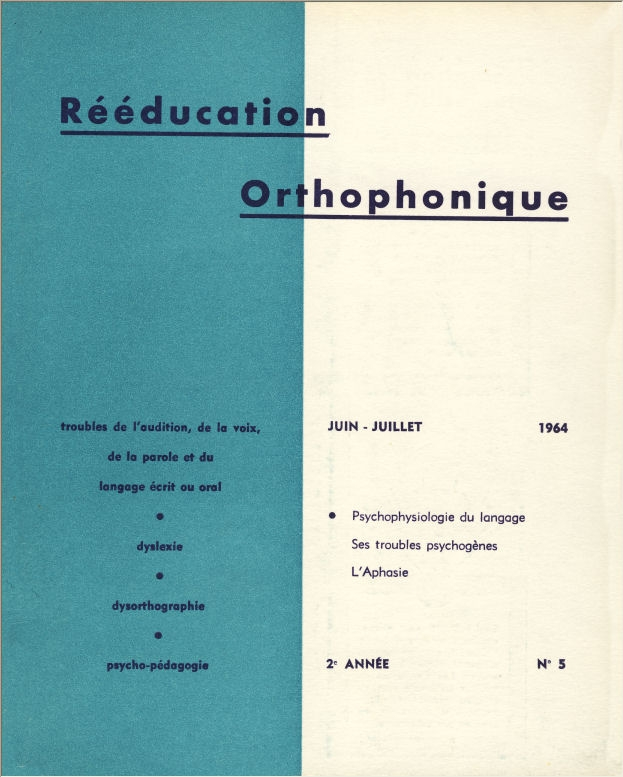 couverture 1964